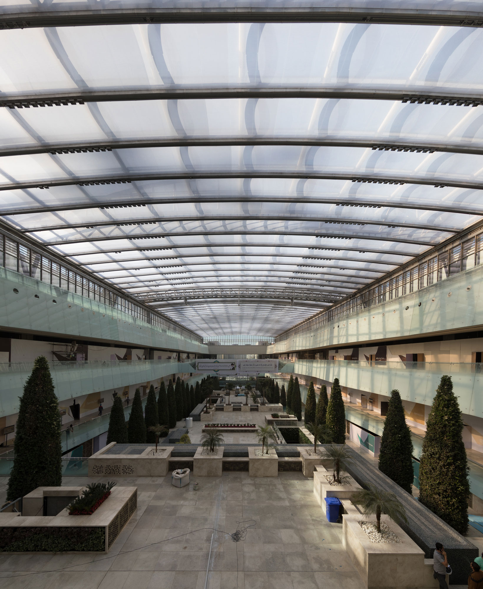 نمای داخلی باغ ماهان ایران مال و سقف ETFE 8500 متر مربعی